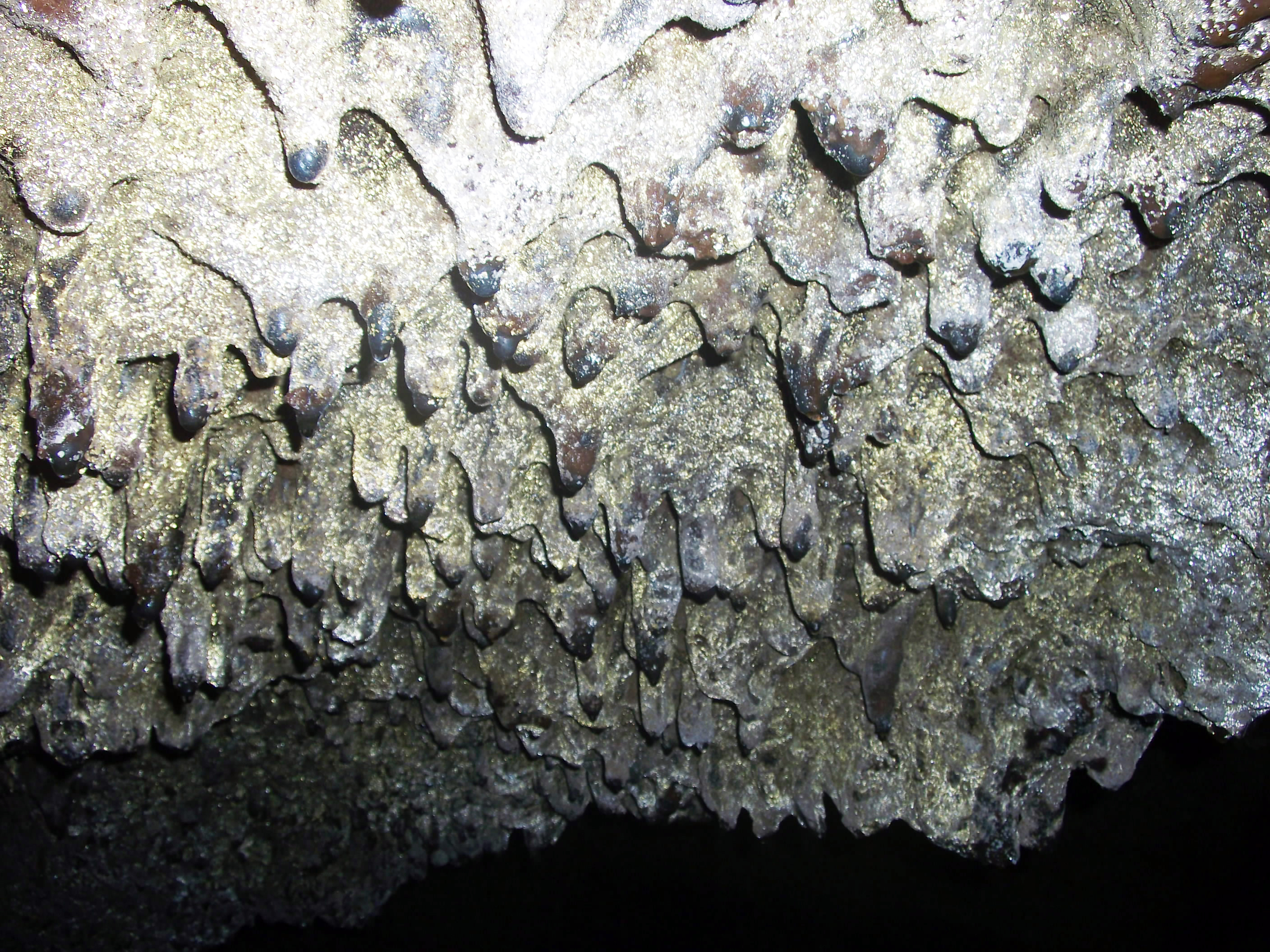 Gruta dos Balcões, formações geológicas, Biscoitos, Praia da Vitória, Terceria, Açores